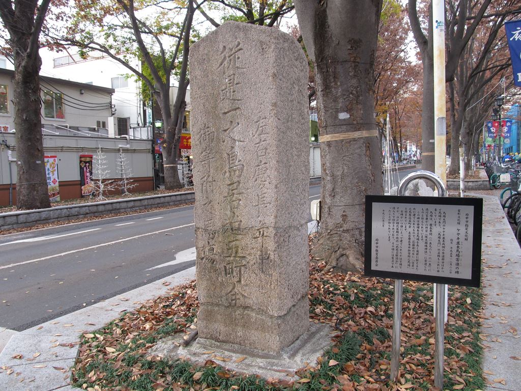 東京都府中市 Fuchu-city, Tokyo